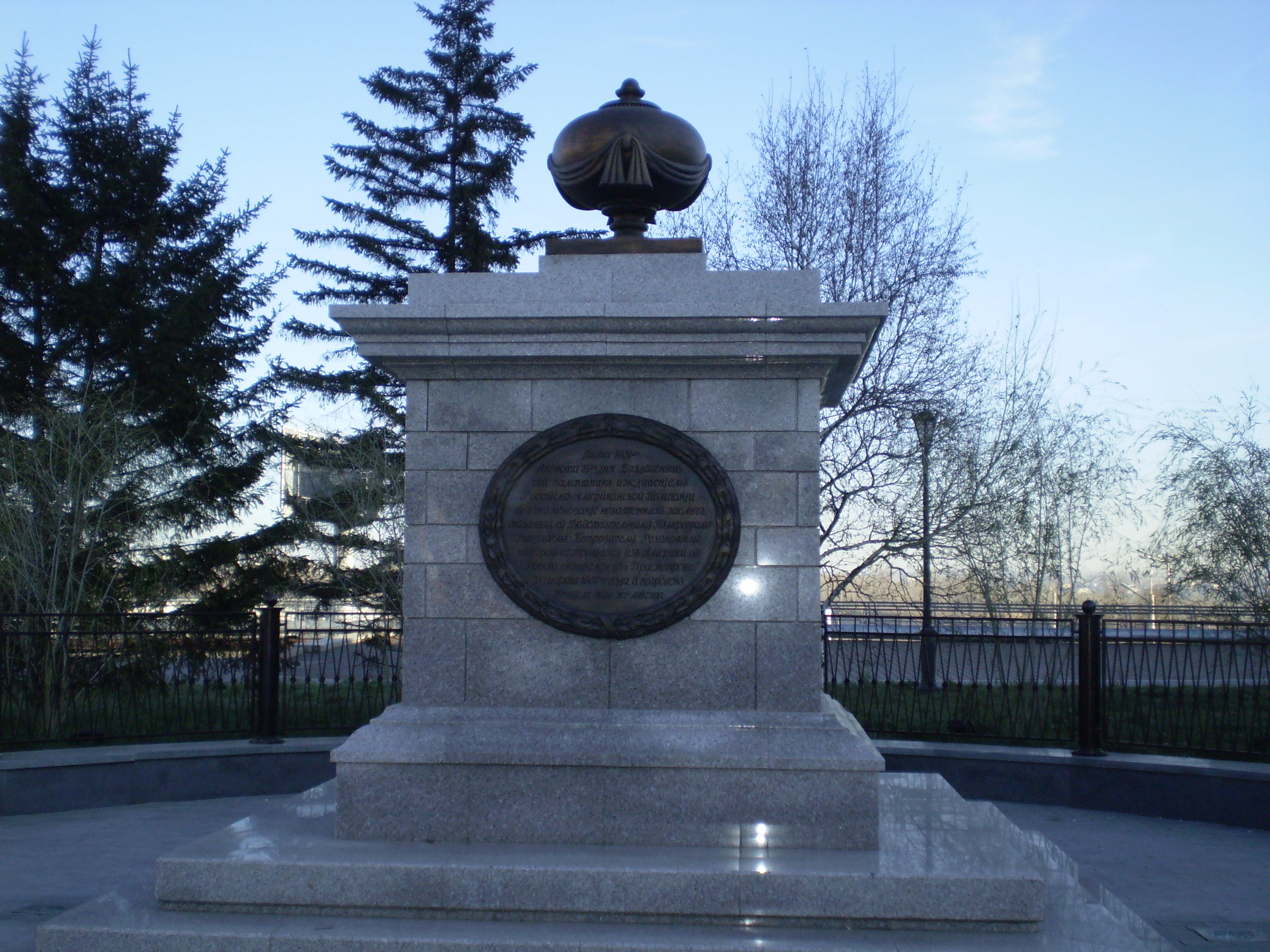 Памятник на могиле Резанова